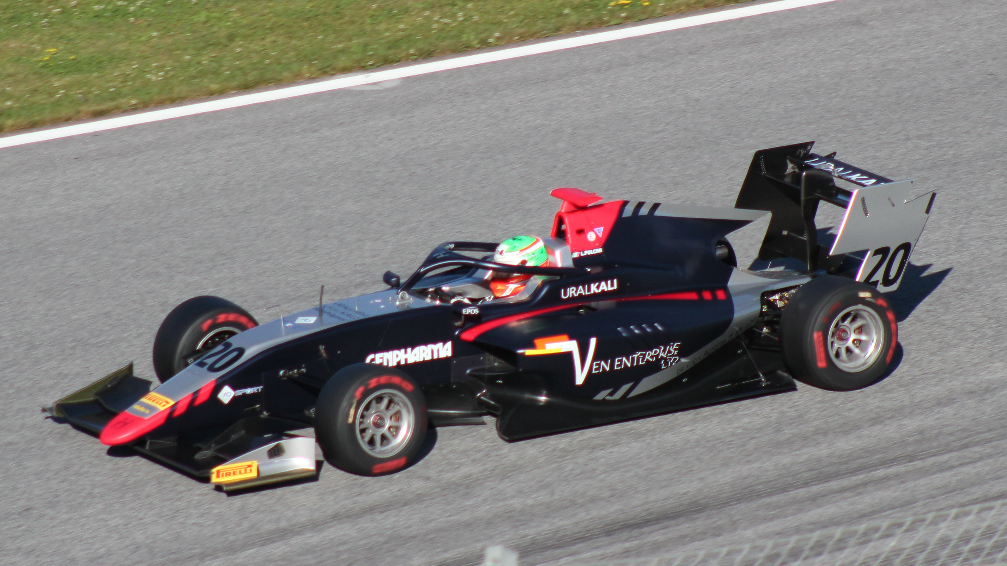 Pulcini beim Rennwochenende in Österreich 2019